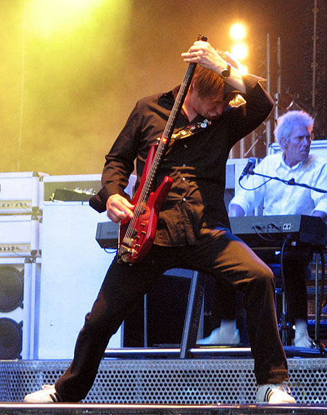 John "Rhino" Edwards at Brunnsparken, Örebro, Sweden